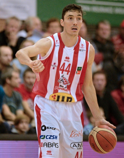 Jiří Welsch. Zápas 7.kola KNBL mezi týmy BK JIP Pardubice a ČEZ Basketball Nymburk. Hráno v Pardubicích dne 4.11.2017